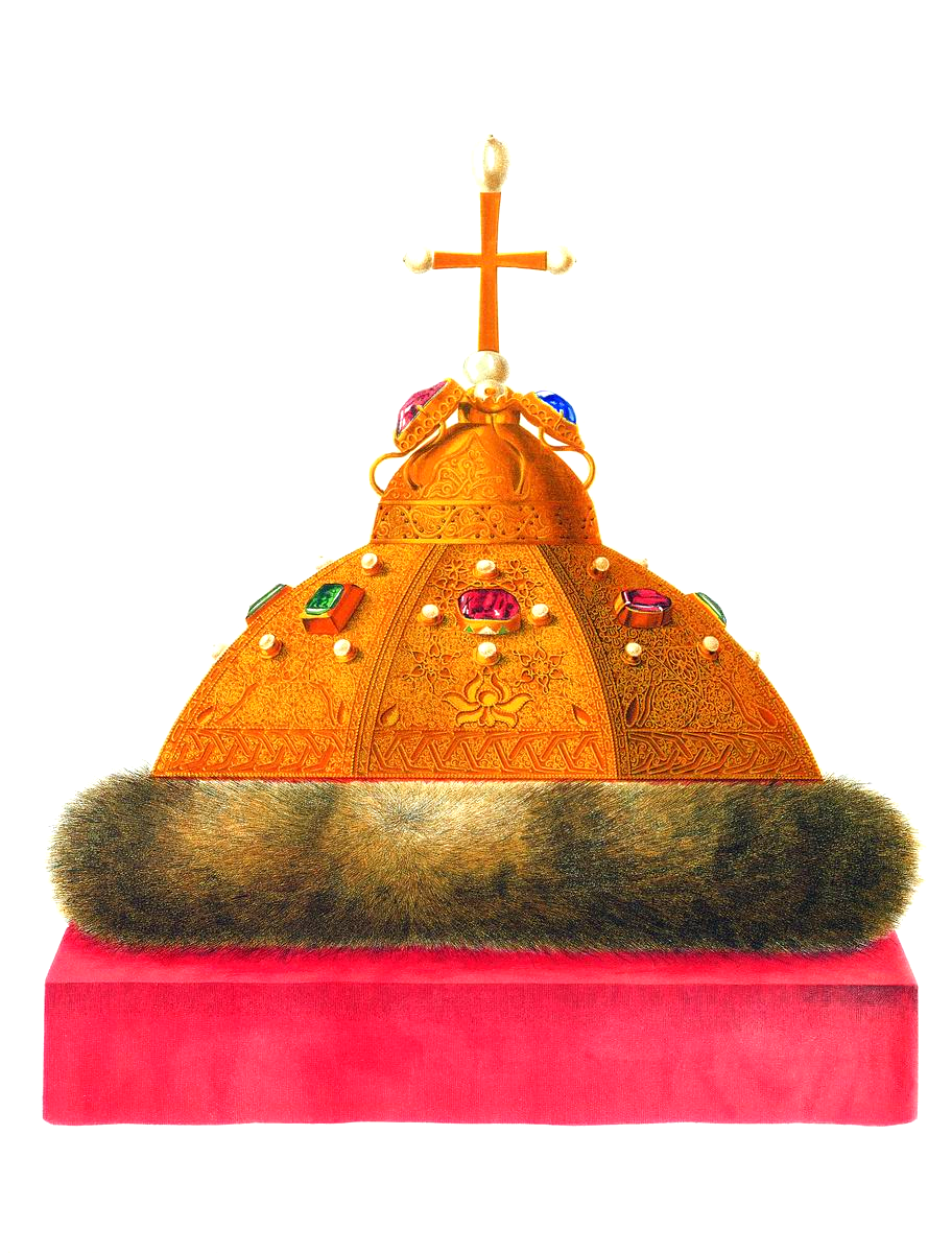 Monomakh`s Cap